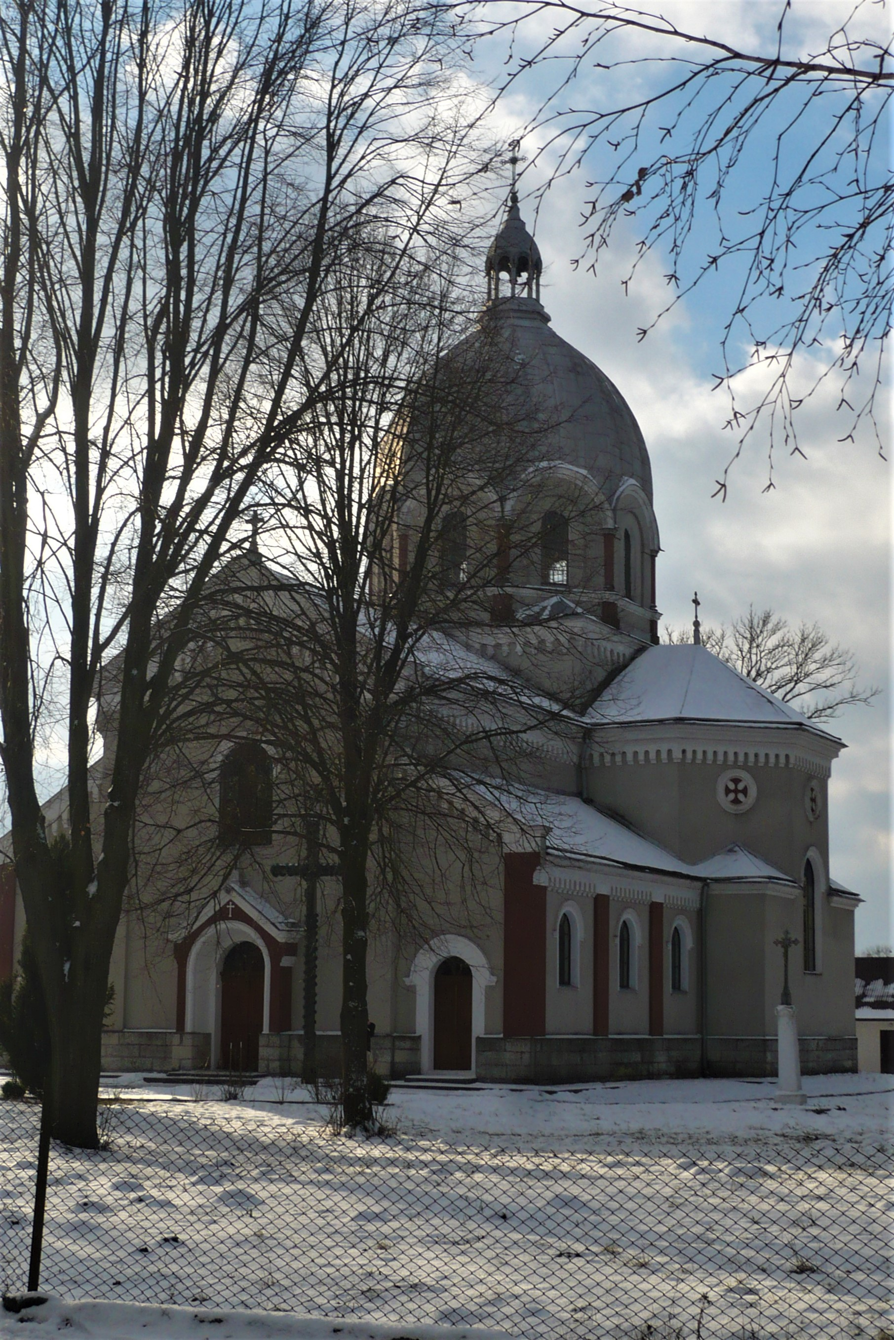 Biały Kamień. Cerkiew